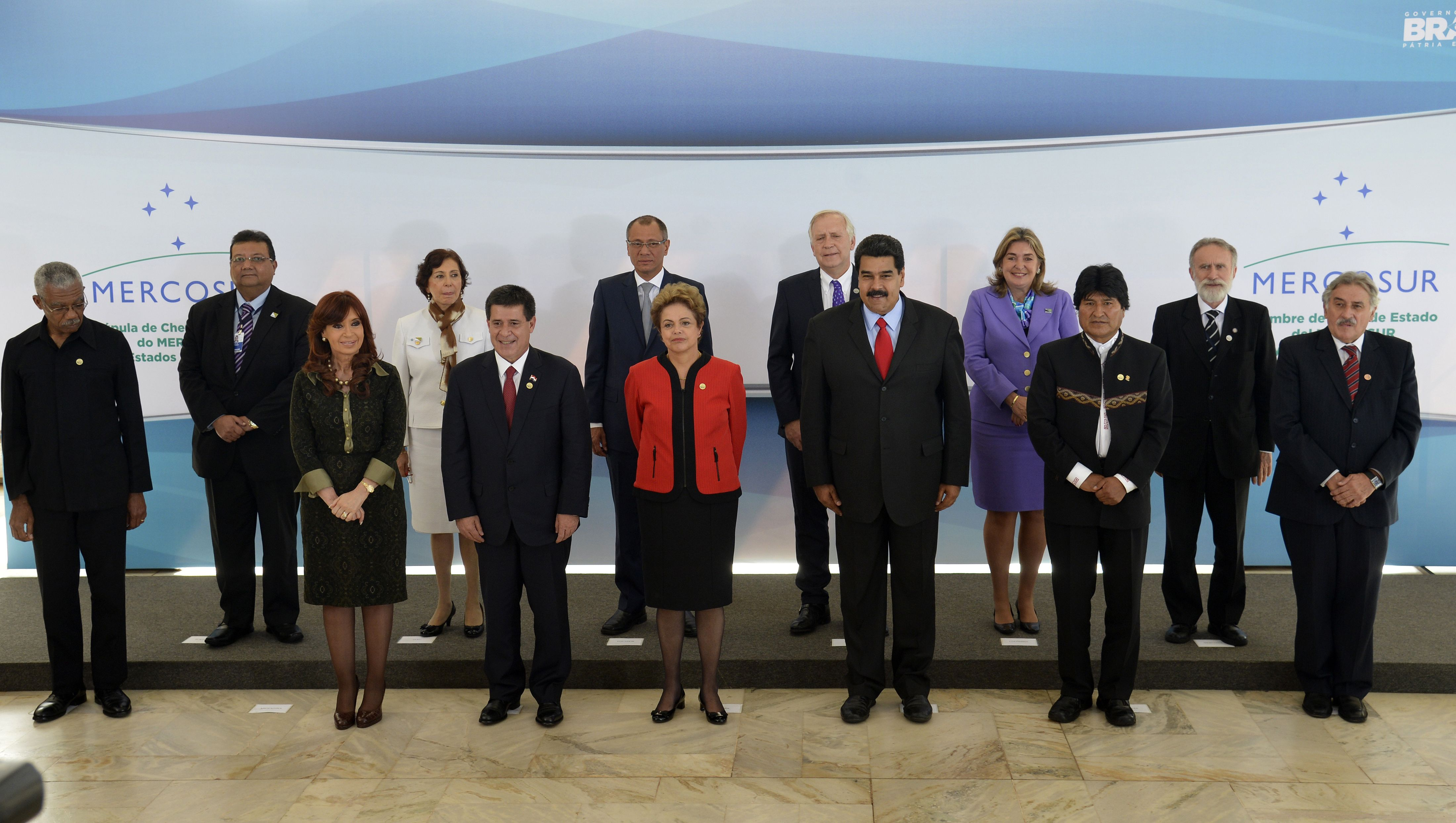 Foto oficial dos chefes dos Estados Partes e Associados do Mercosul (Wilson Dias/Agência Brasil)